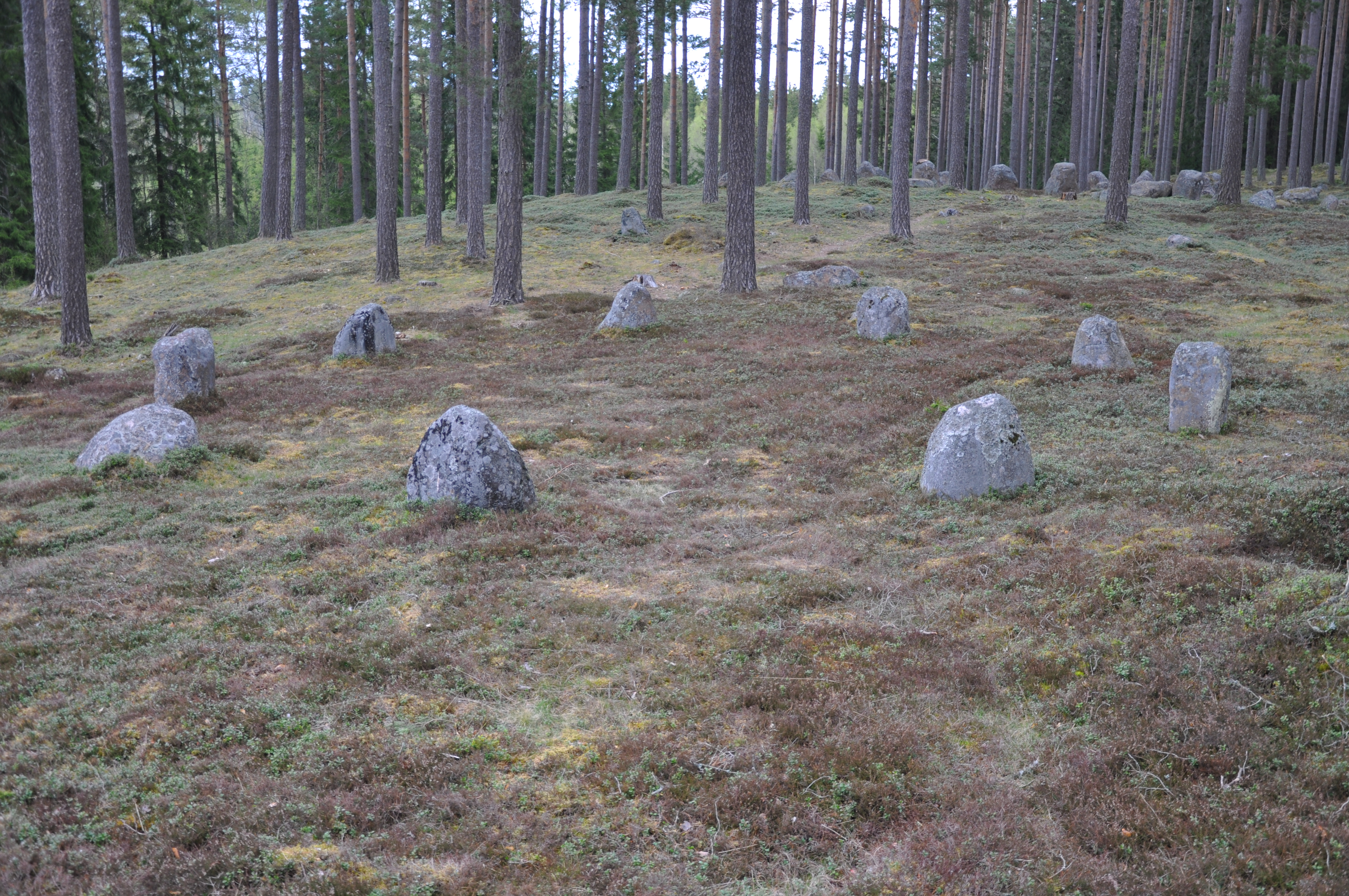 Domarring i Bruadungen, Flisby socken i Jönköpings län